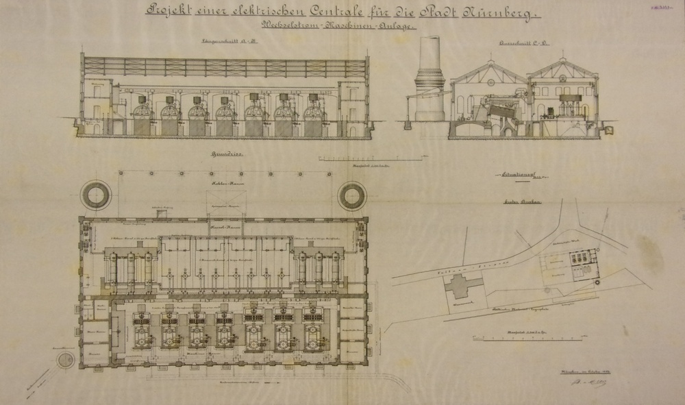 Grundriss des geplanten Kraftwerks Tullnau aus der Konzeptstudie von Oskar von Miller von 1893